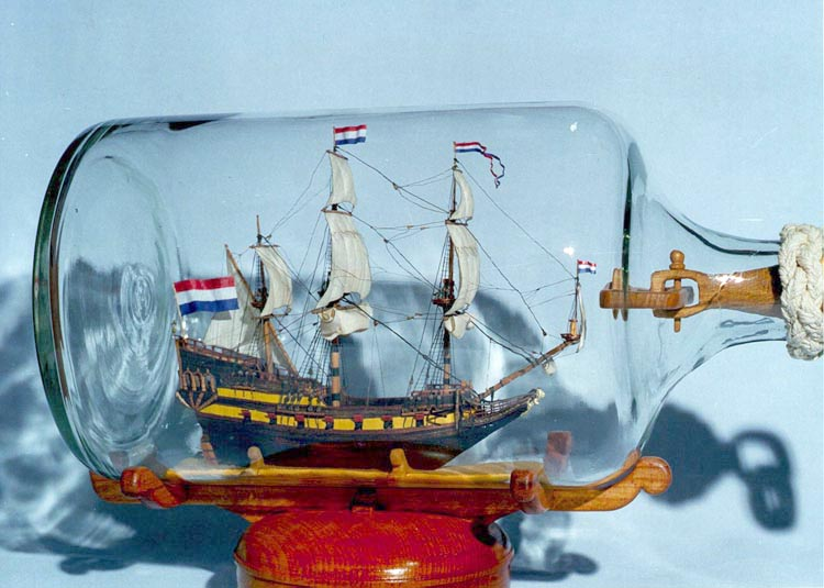 Парусный корабль в бутылке.